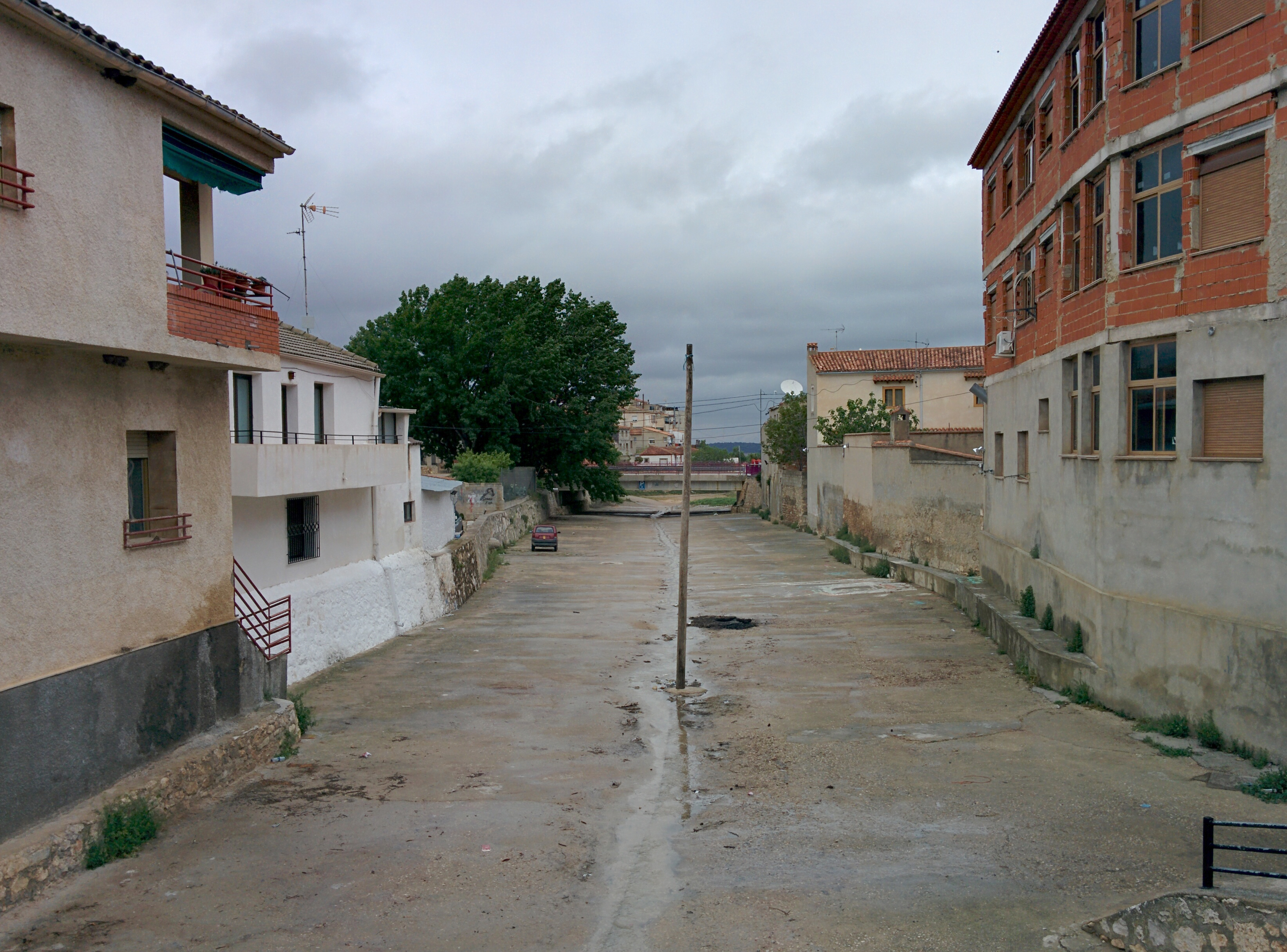 Barranco del Reventón a su paso por Alatoz (Albacete, España).